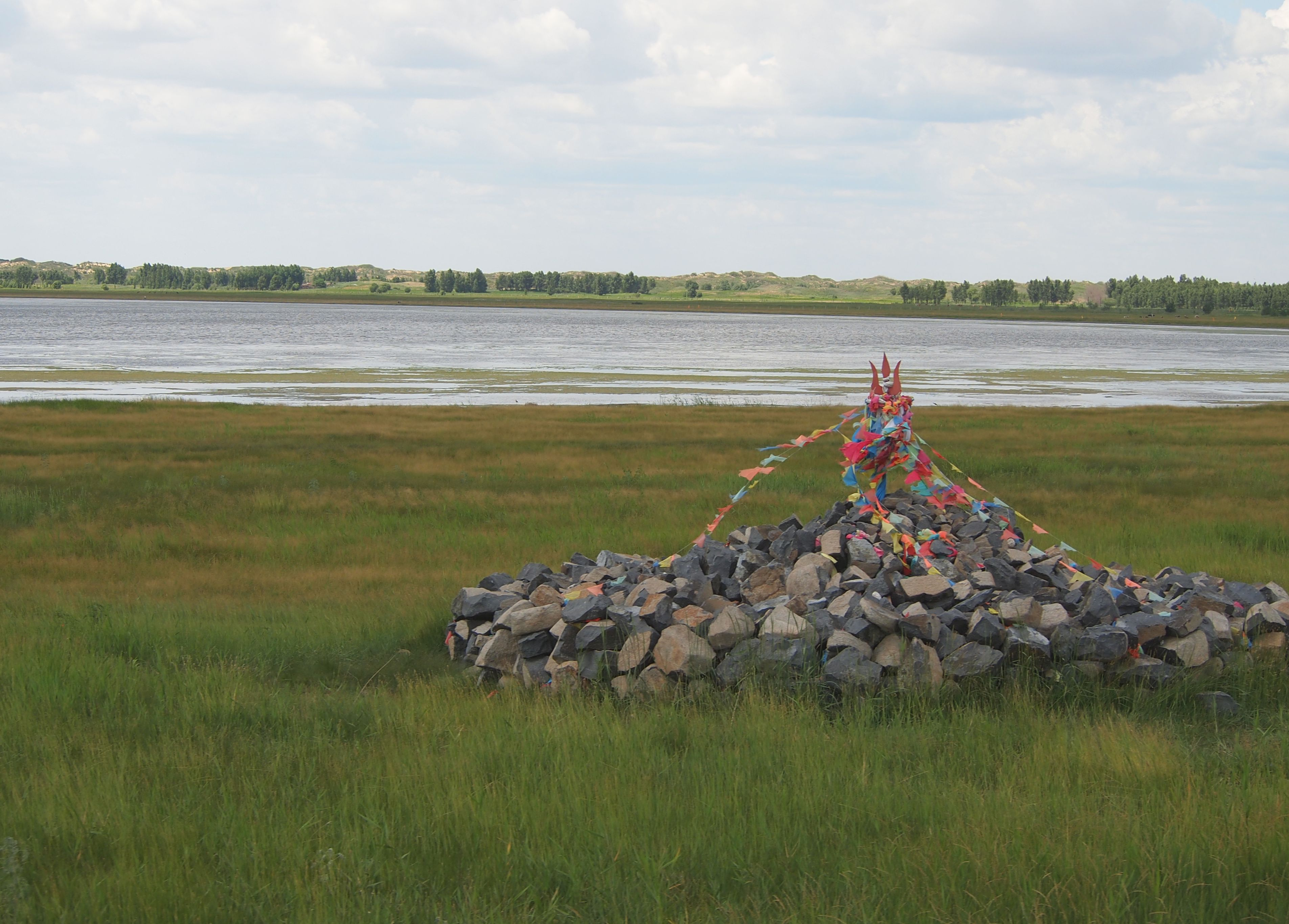 敖包 - Ovoo - 2011.07